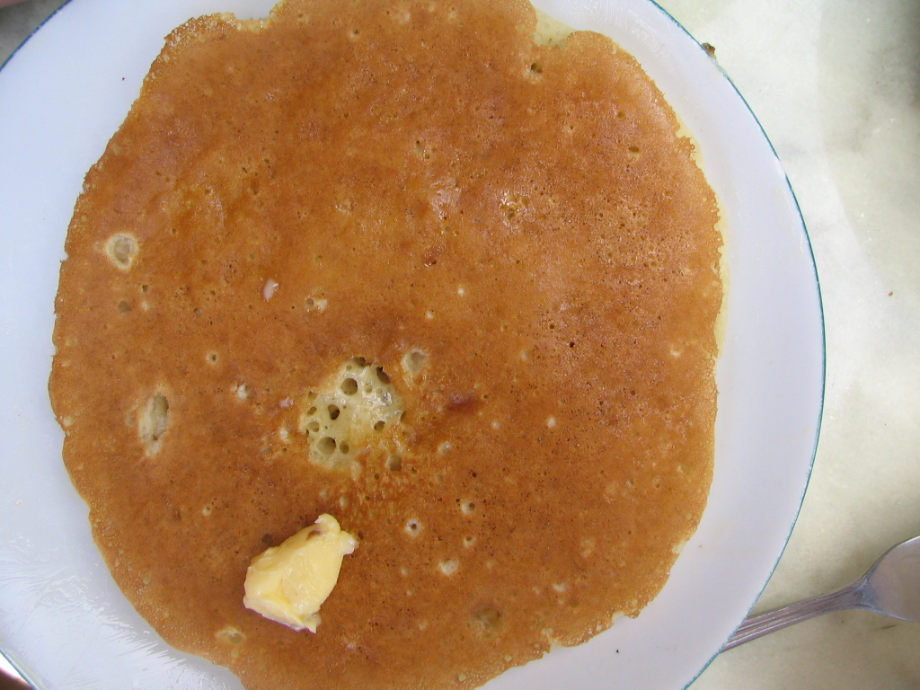 Колак